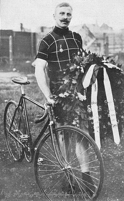 Thorvald Ellegaard, dänischer Radrennfahrer